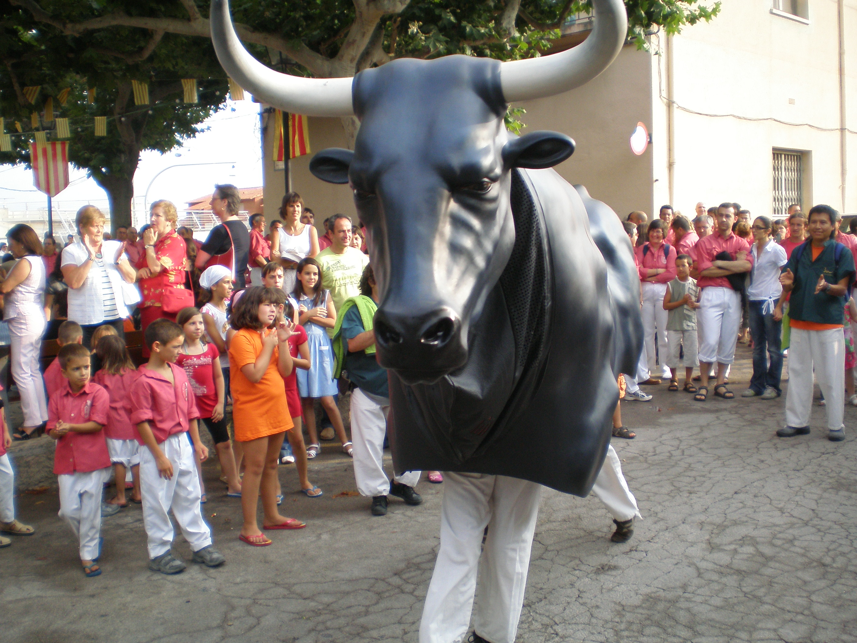 Bou de Reus